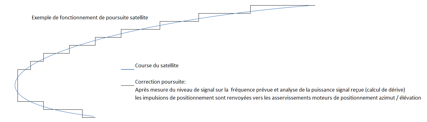 Schéma décrivant le principe des corrections d'asservissements pour poursuite satellite